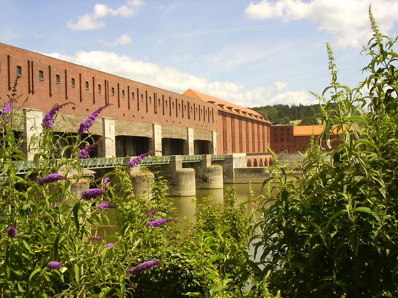 Wasserkraftwerk Passau West